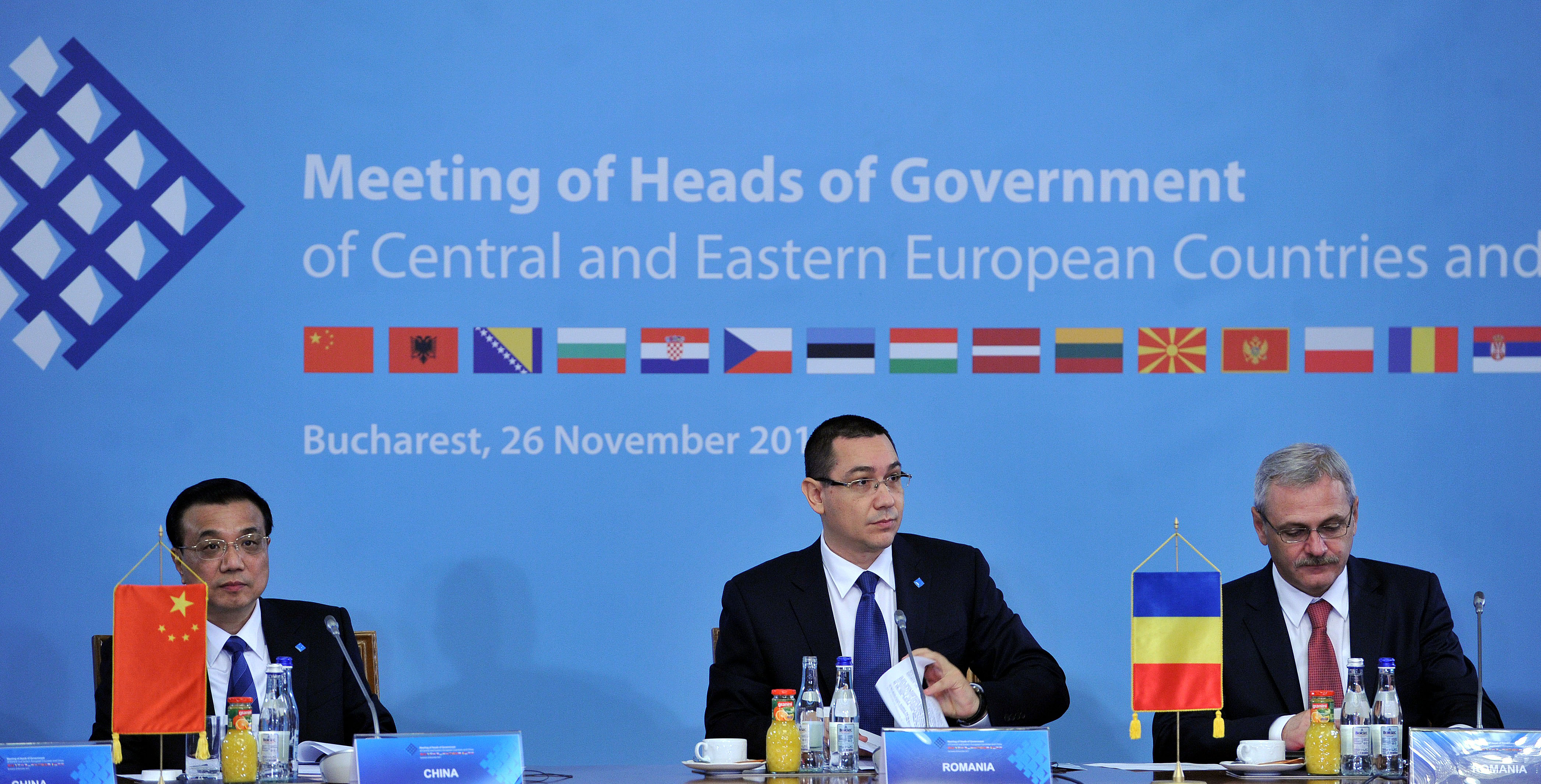 Summit-ul Premierilor din Europa Centrala si de Est - China, Bucuresti